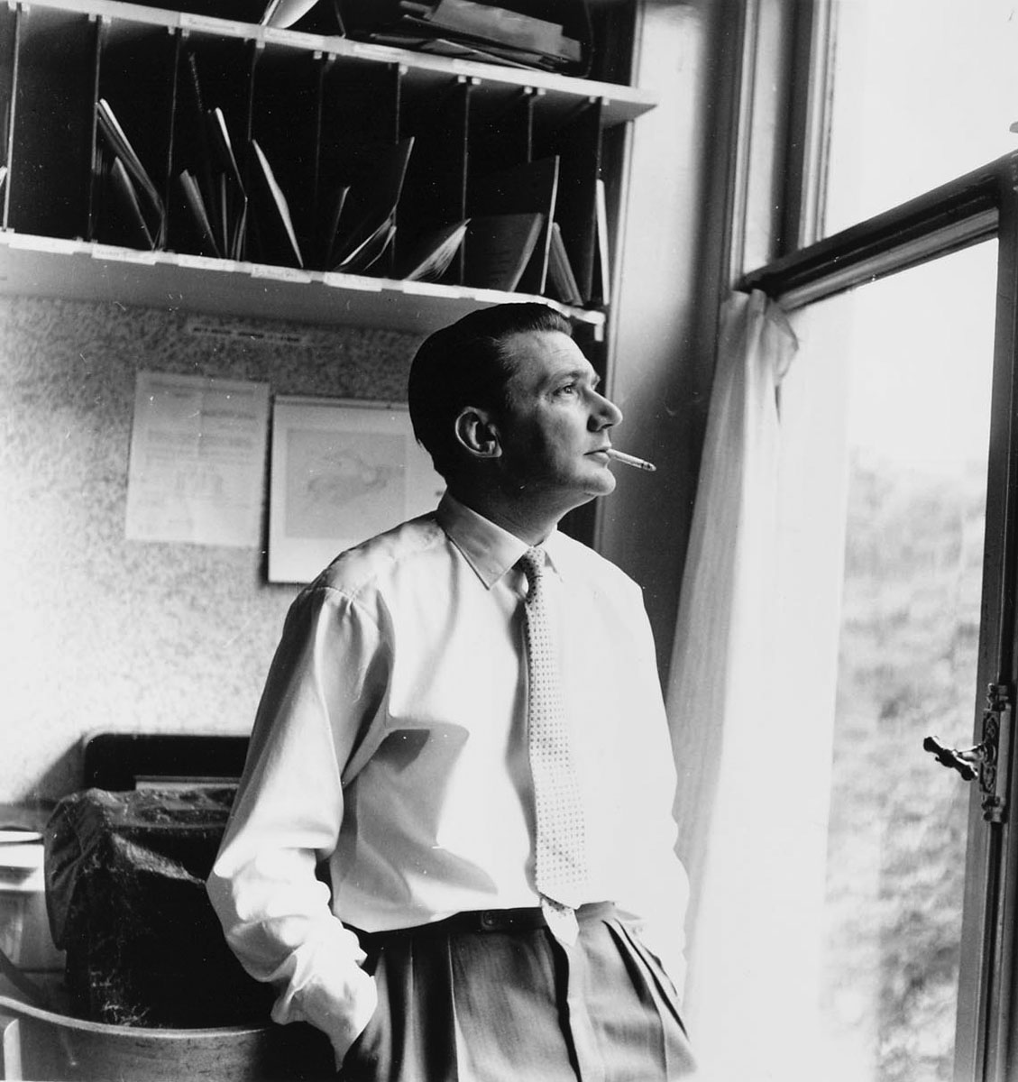 Ben van Meerendonk op het kantoor van AHF, Keizersgracht 207, 27 mei 1958 Foto AHF, collectie IISG, Amsterdam